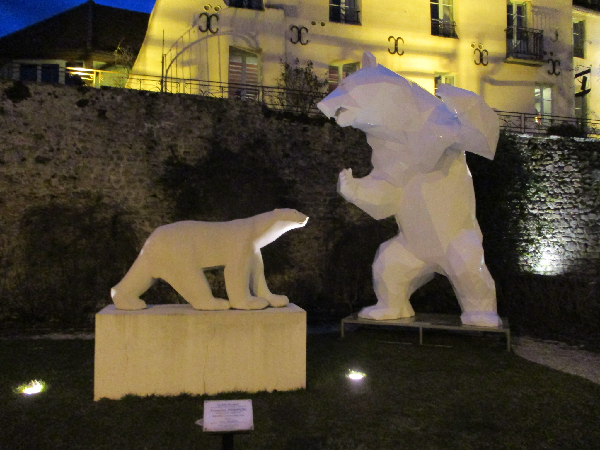 Square Alexandre Dumaine et ours blanc de Pompon et de Richard Orlinski (en face de la Cote d'Or de Saulieu)